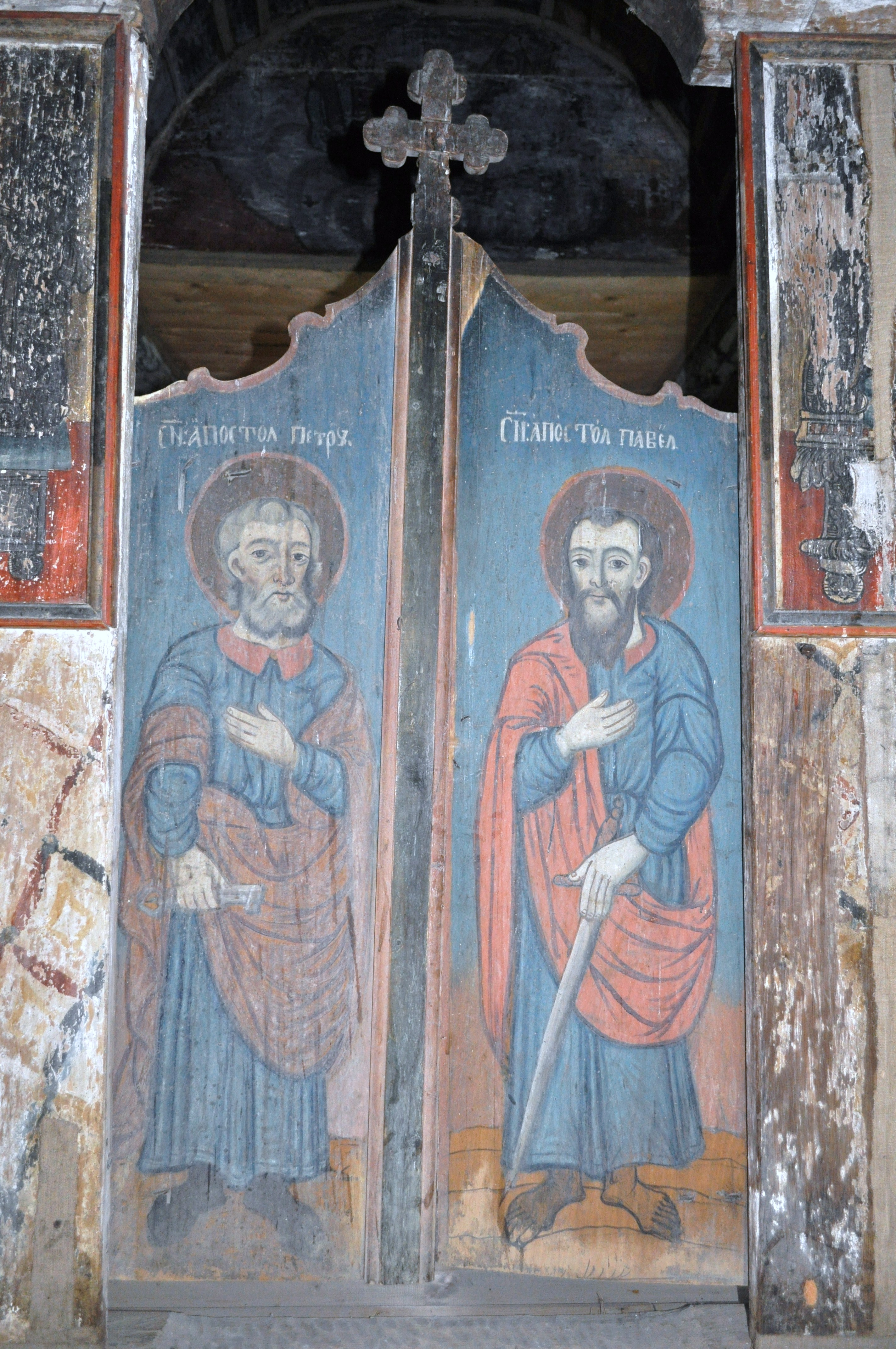 Biserica de lemn din Troaș